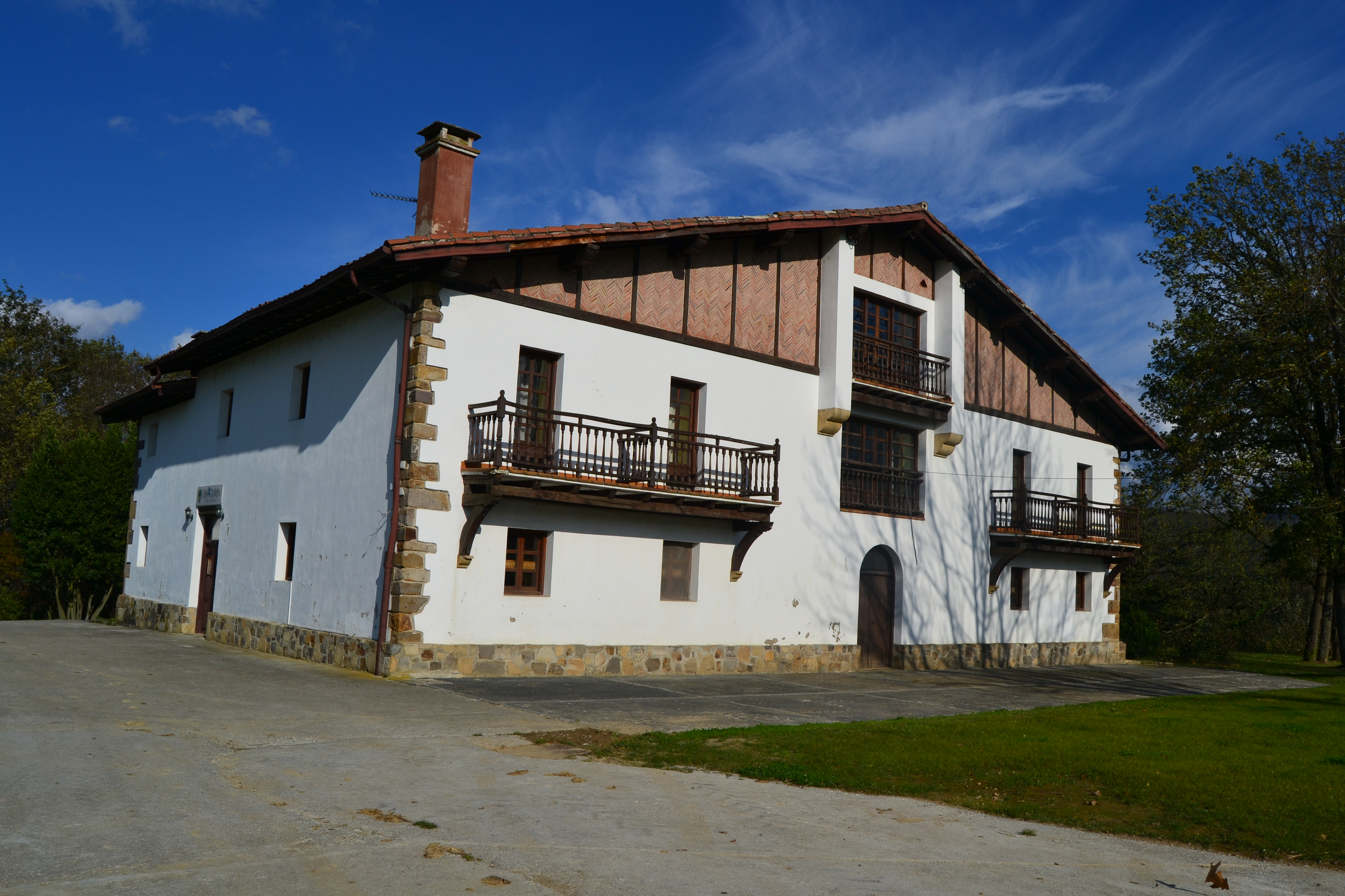 Oiangu. Ordizia, Gipuzkoa. Euskal Herria.